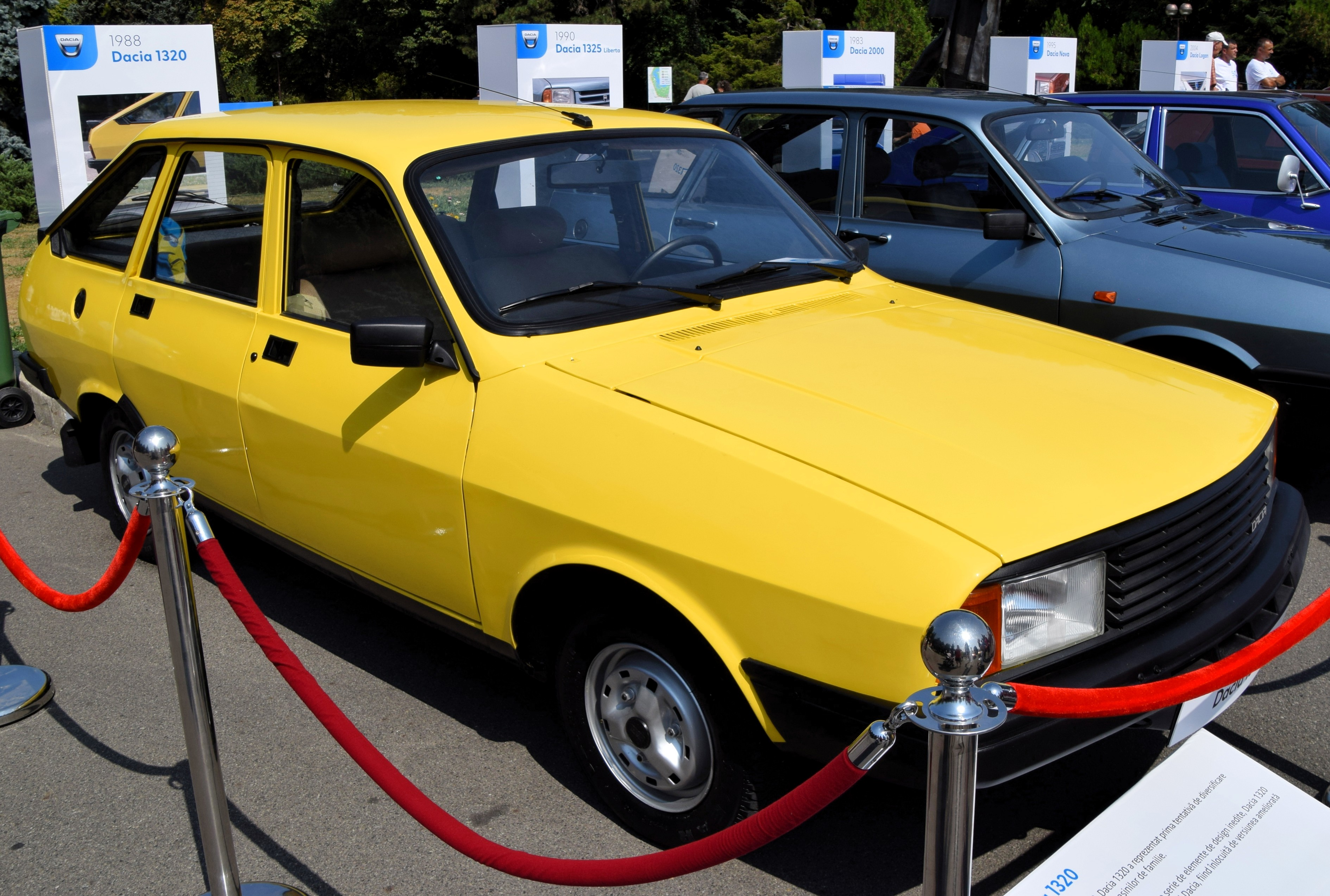 Dacia 1320 expusă în Parcul Herăstrău cu ocazia aniversării a 50 de ani de la apariția Uzinei Dacia.